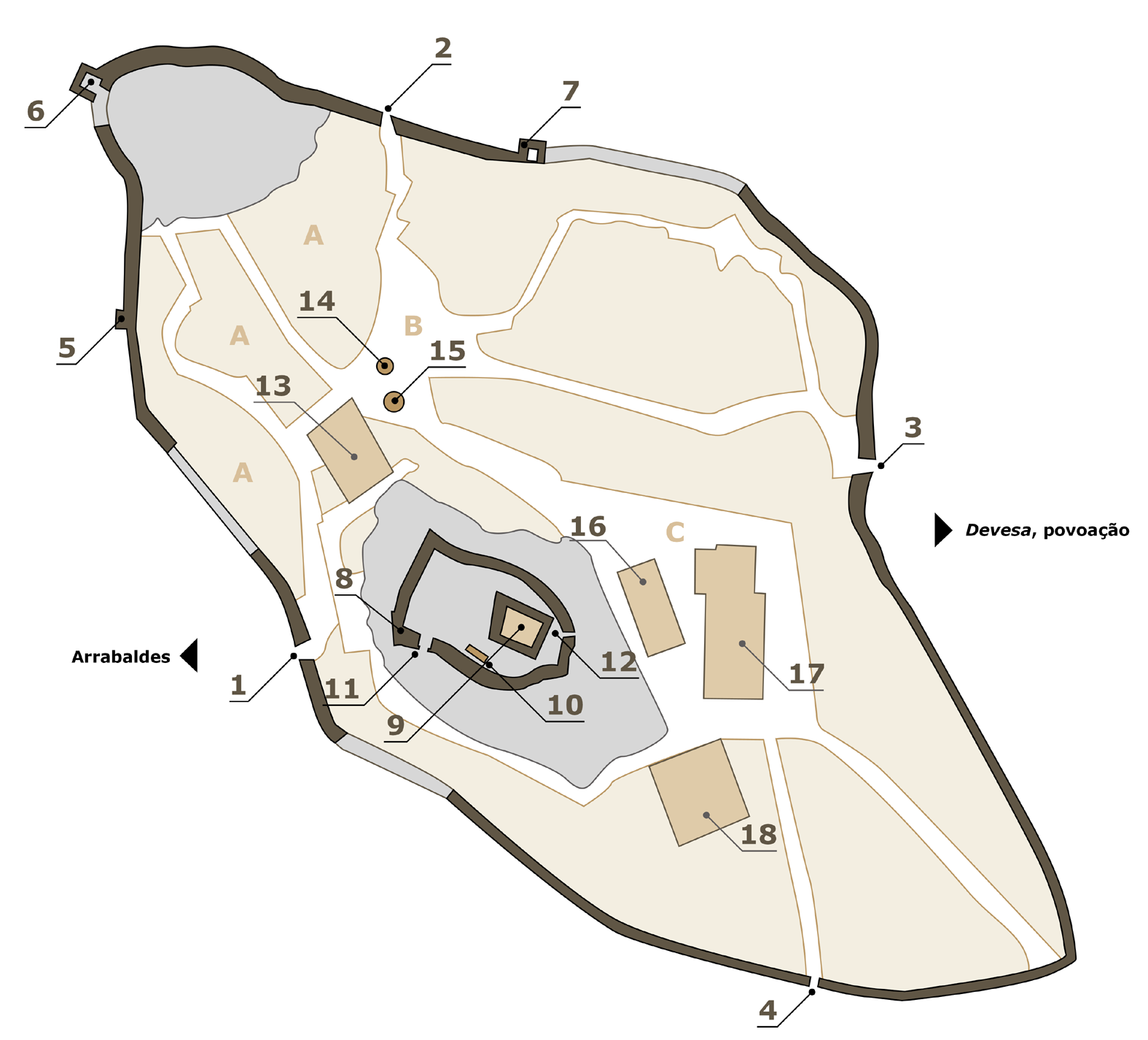 Antiga vila de Marialva: Meda, Guarda, Portugal. Plano do conjunto intra-muros. Representação esquemática. Old village from Marialva: Meda, Guarda, Portugal. Plan from the site inside the walls. Schematic illustration.